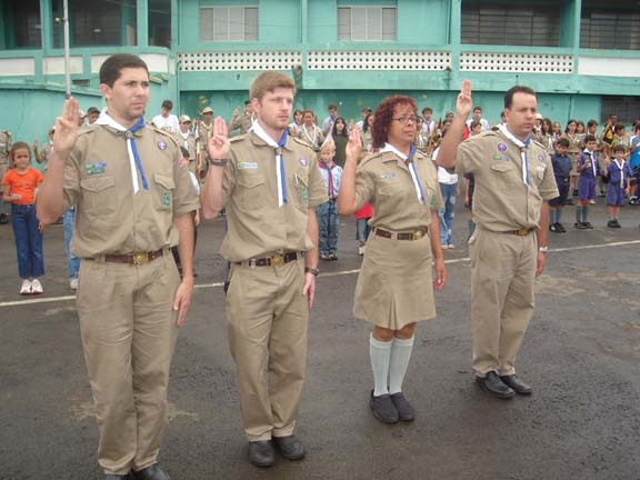 Promessa dos Escotistas/Dirigentes do Grupo Escoteiro Itapema. Brasil